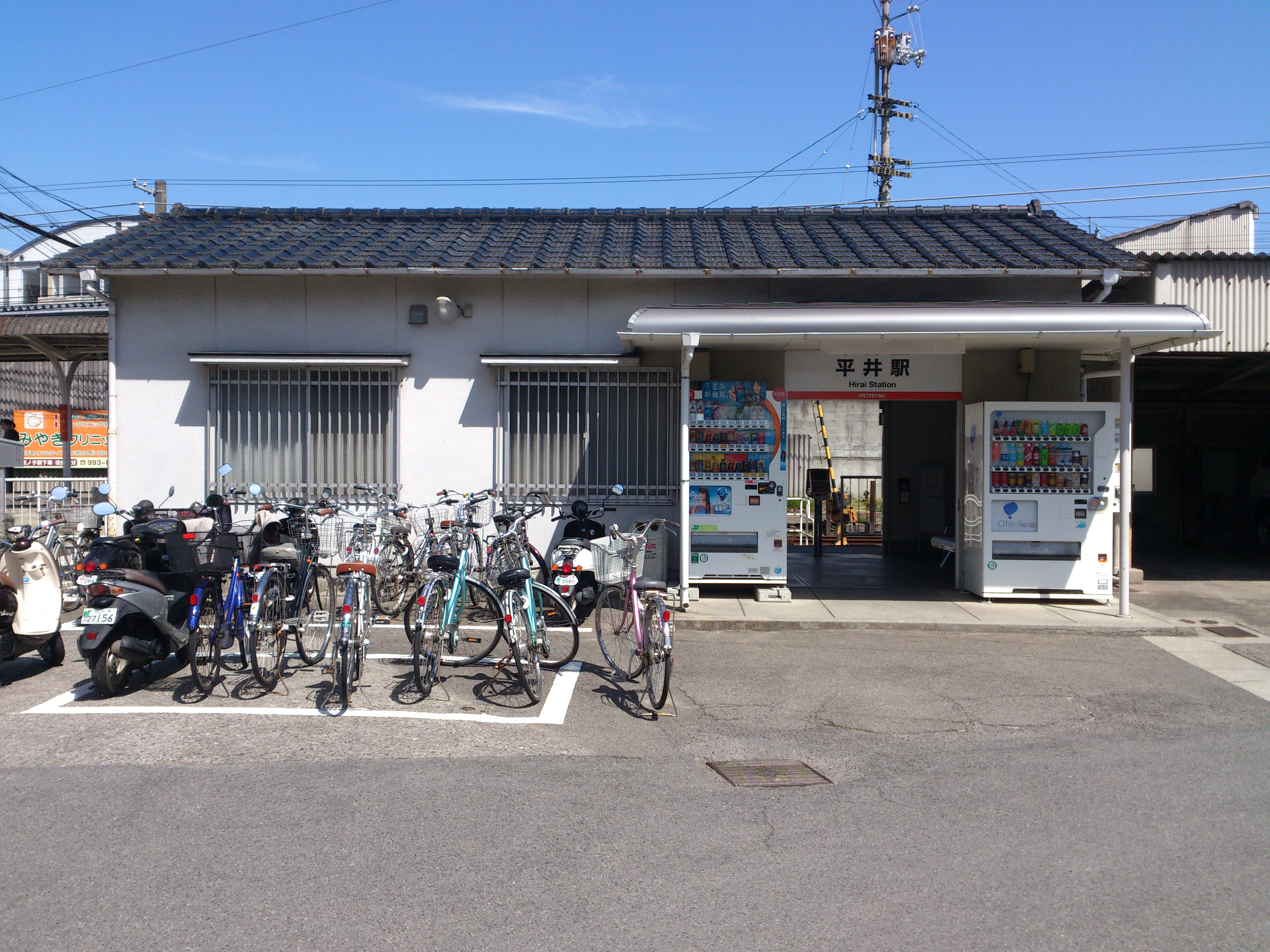 伊予鉄道、平井駅です。